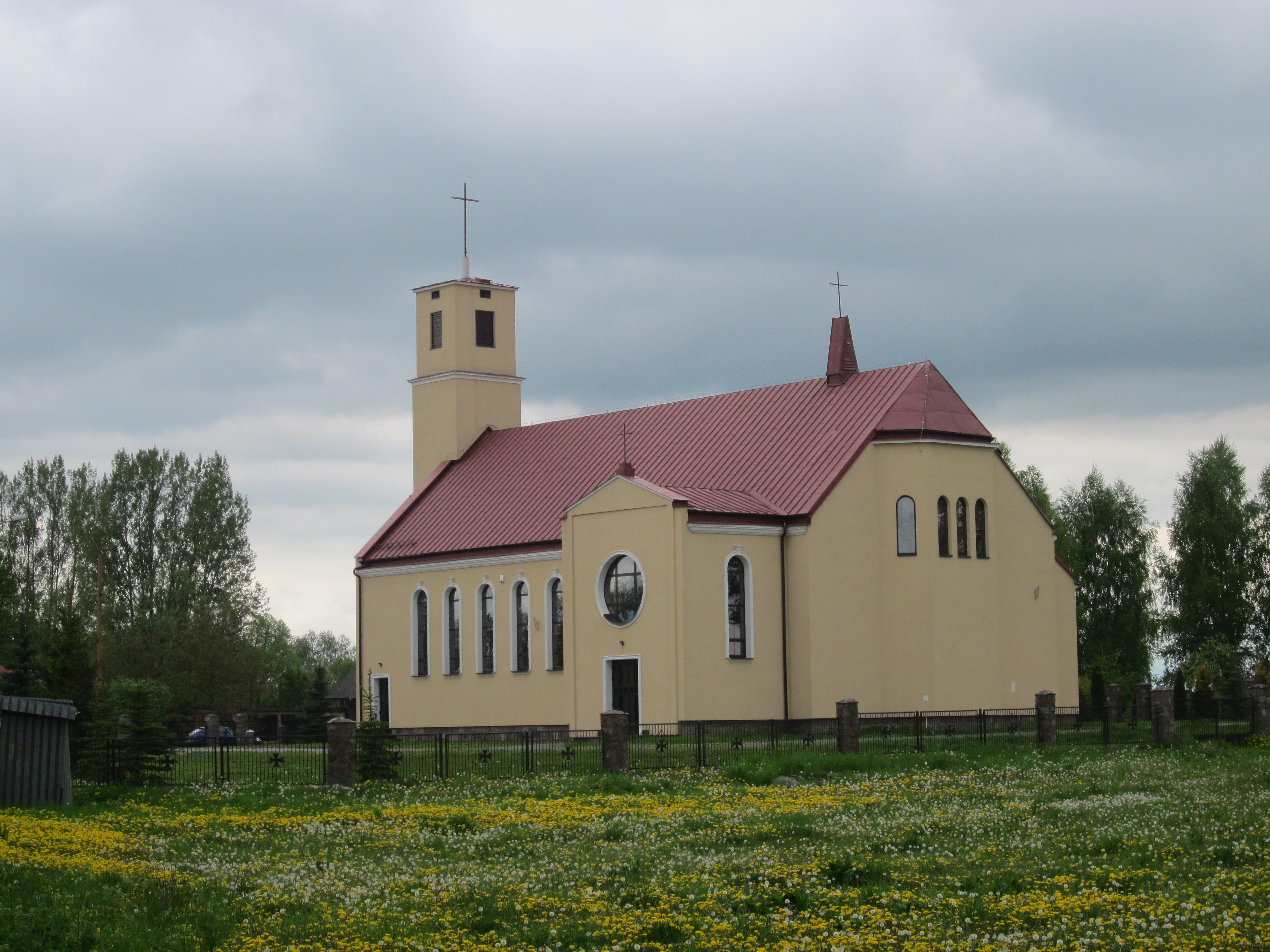 2013 roku obchodzono 40-lecie powstania parafii w Wojnach Krupach.